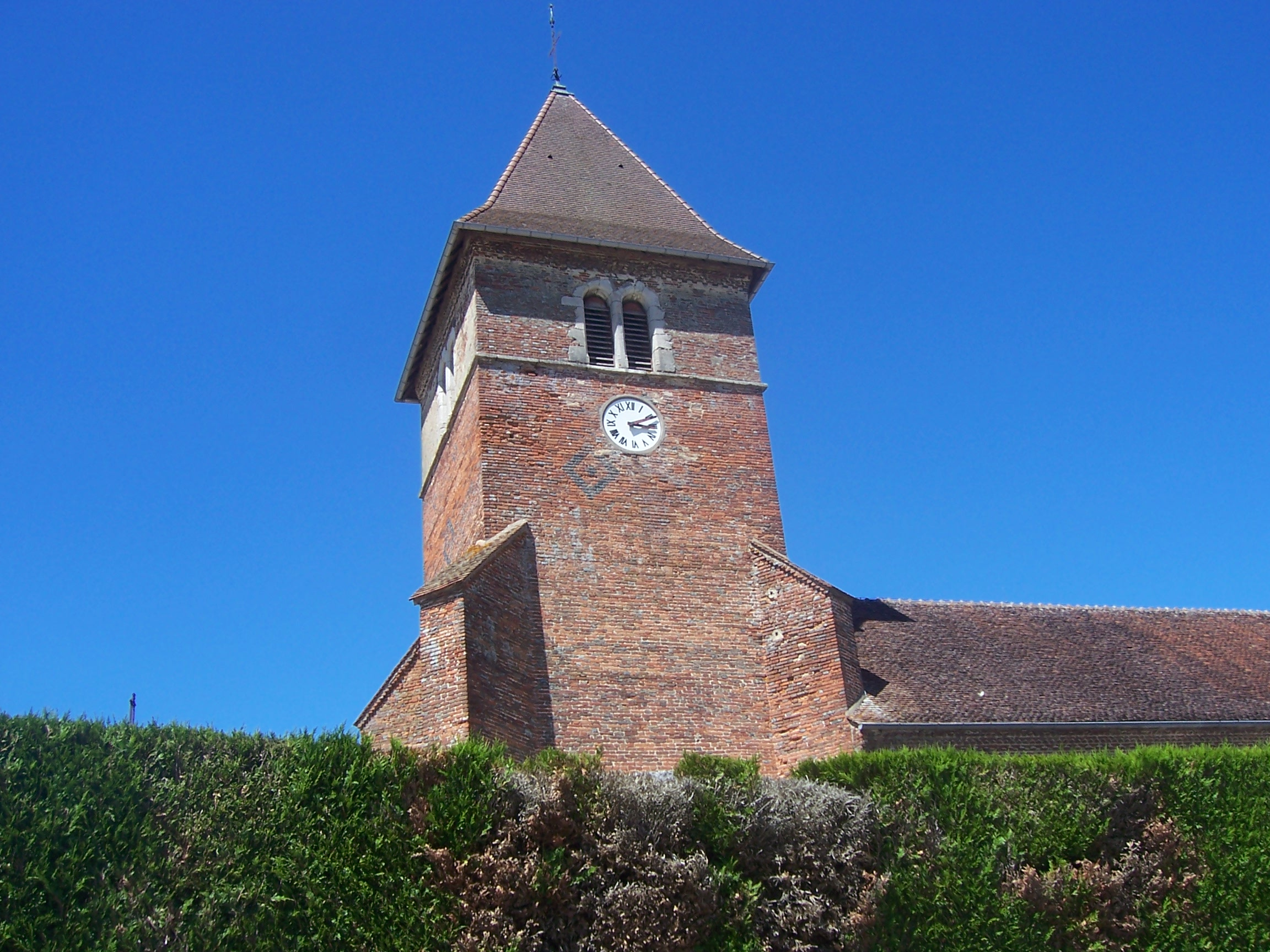 Eglise de Sainte-Croix